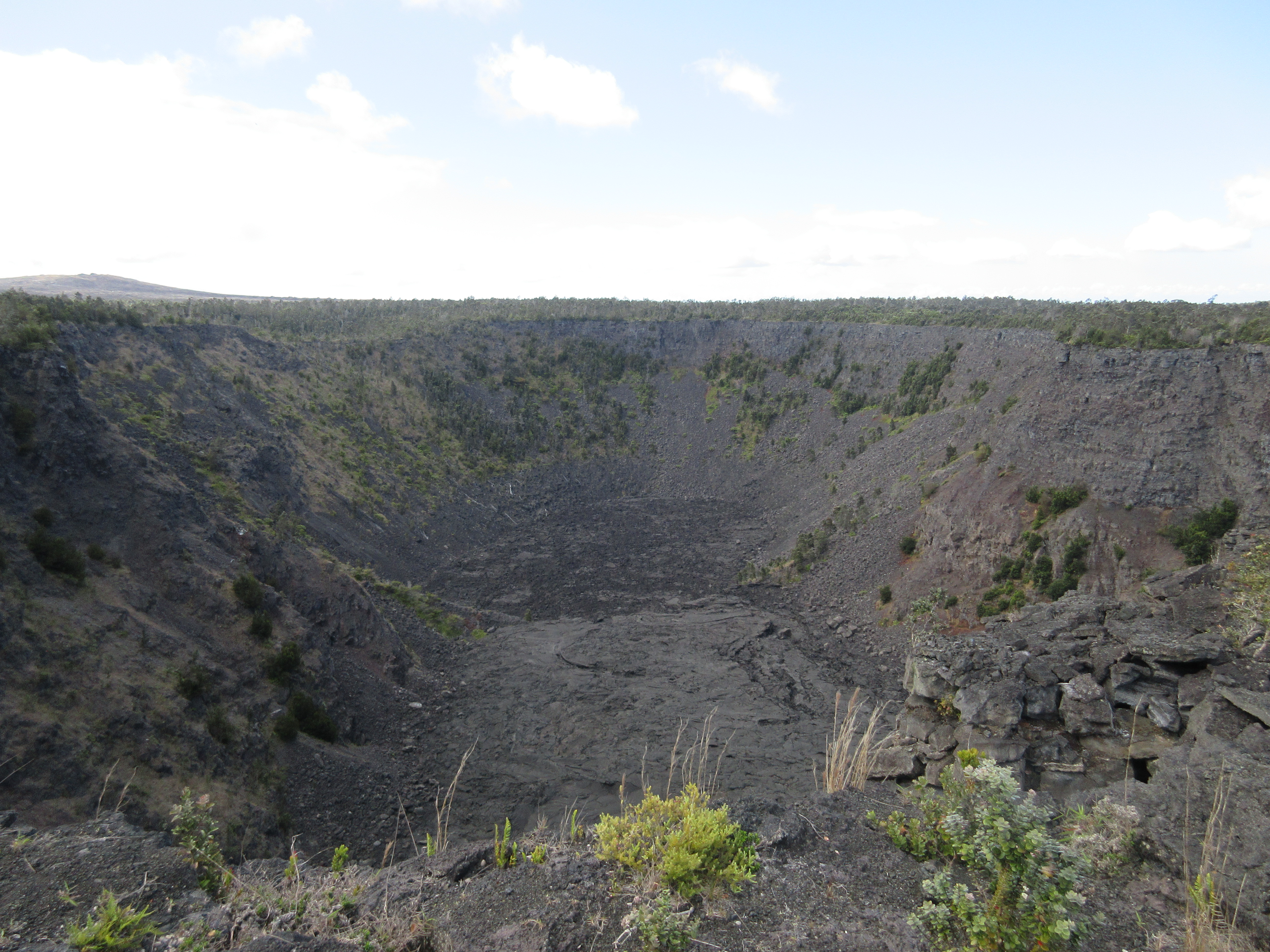 Pauahi crater